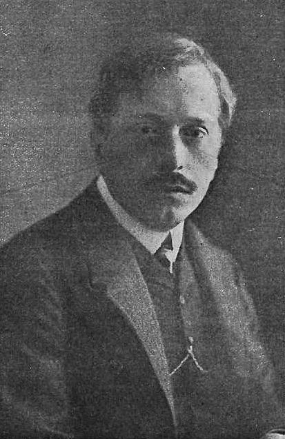 Bolesław Raczyński (-1907)